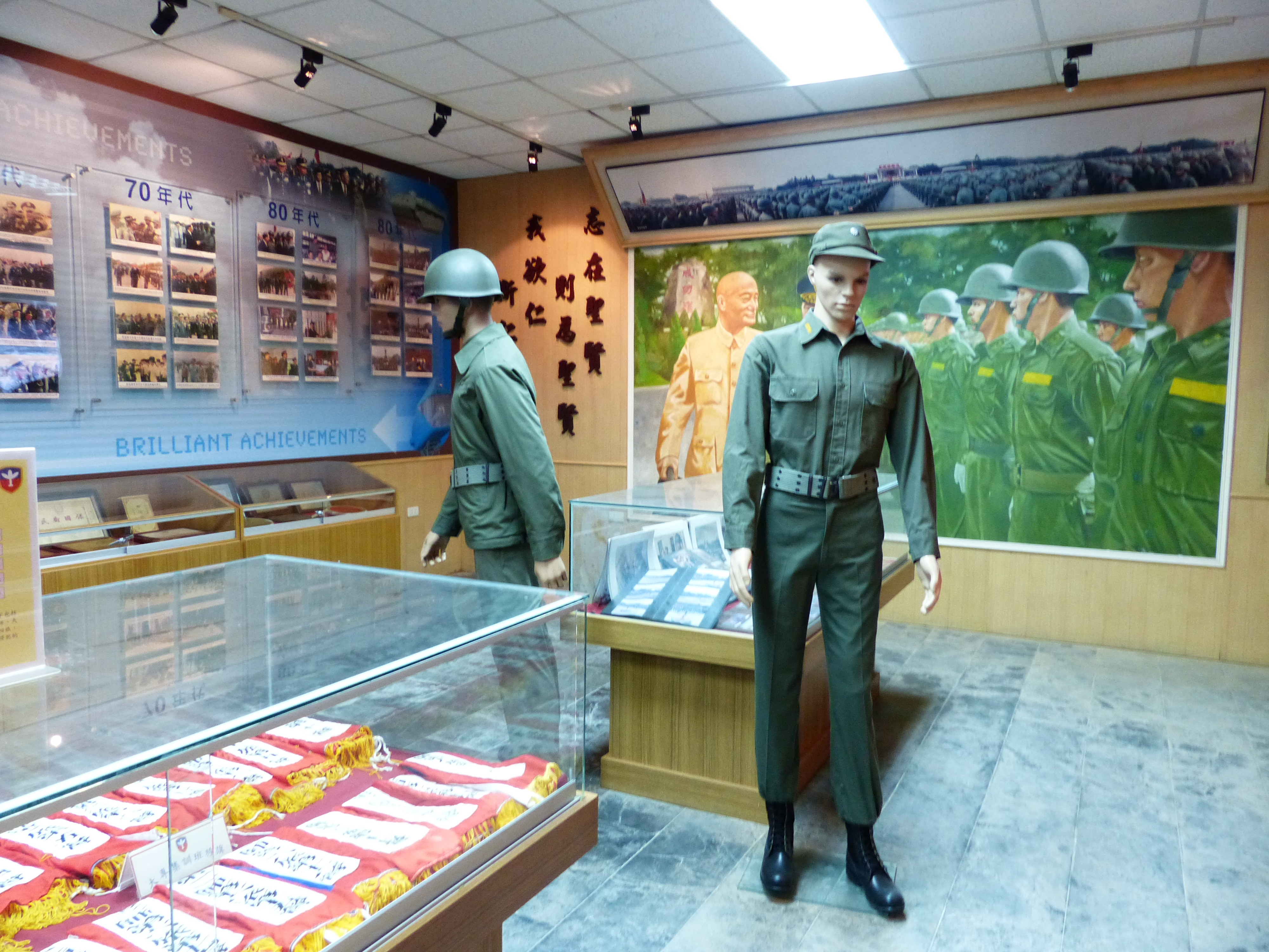 成功嶺隊史館展示的大專學生暑期集訓制服。